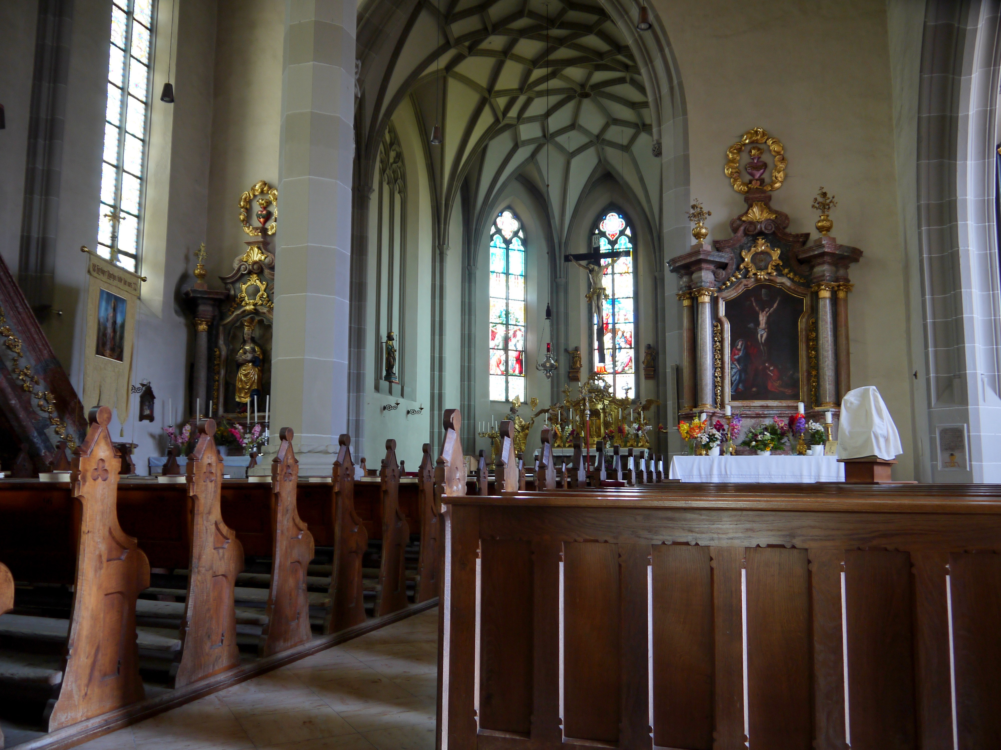 Kath. Pfarrkirche hl. Gallus und ehem. Friedhof